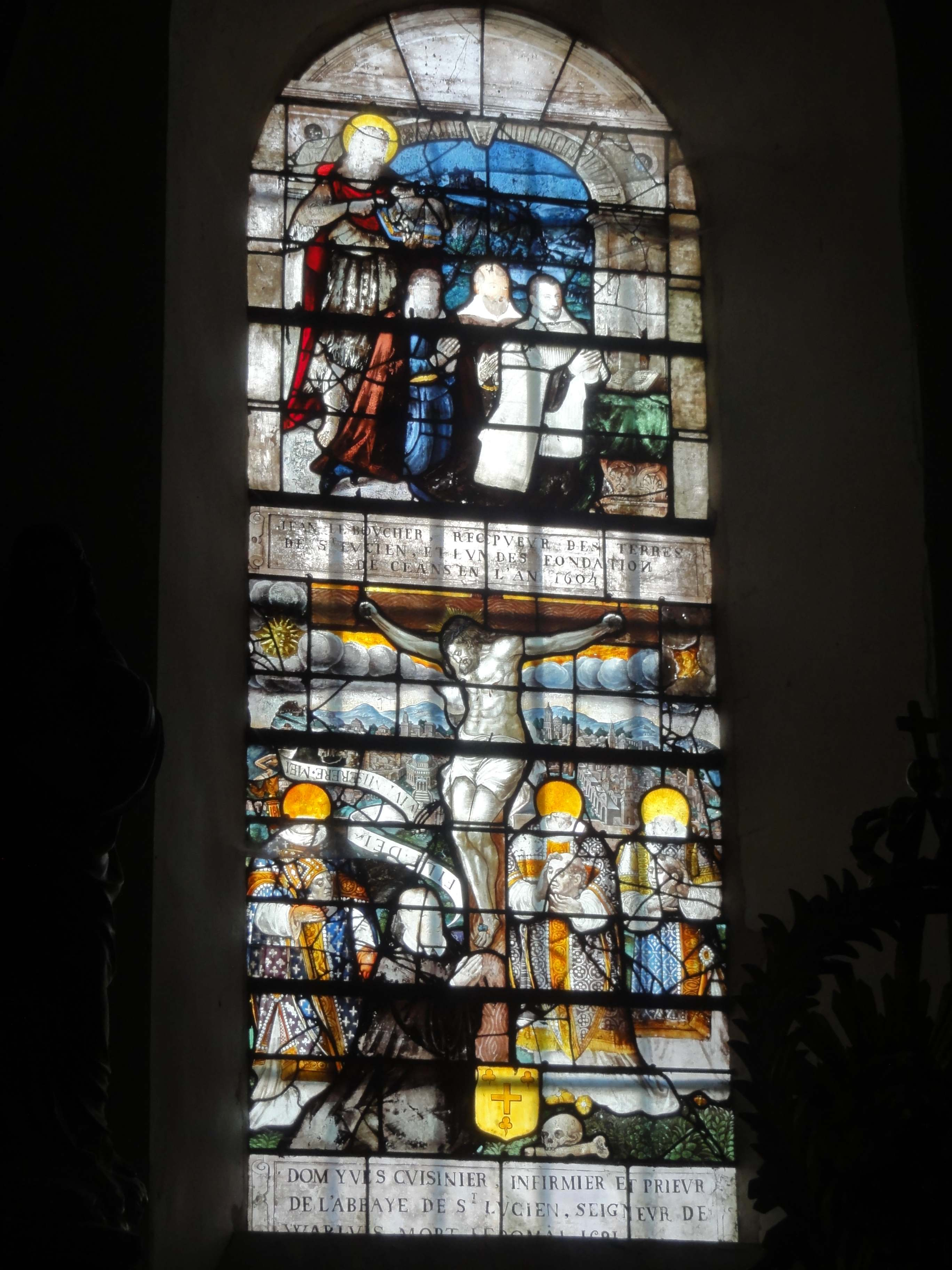 Vitrail de l'église - voir titre.